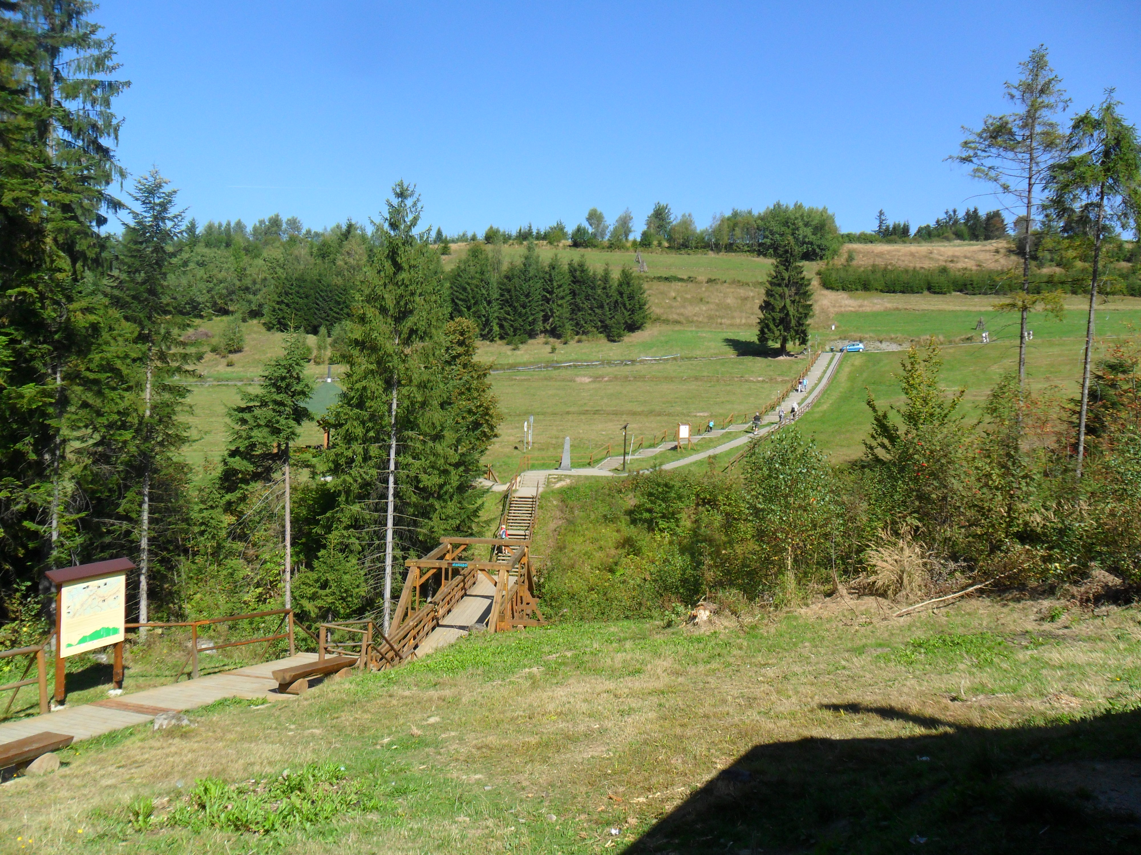 Trojmedzie Česko-Poľsko-Slovensko